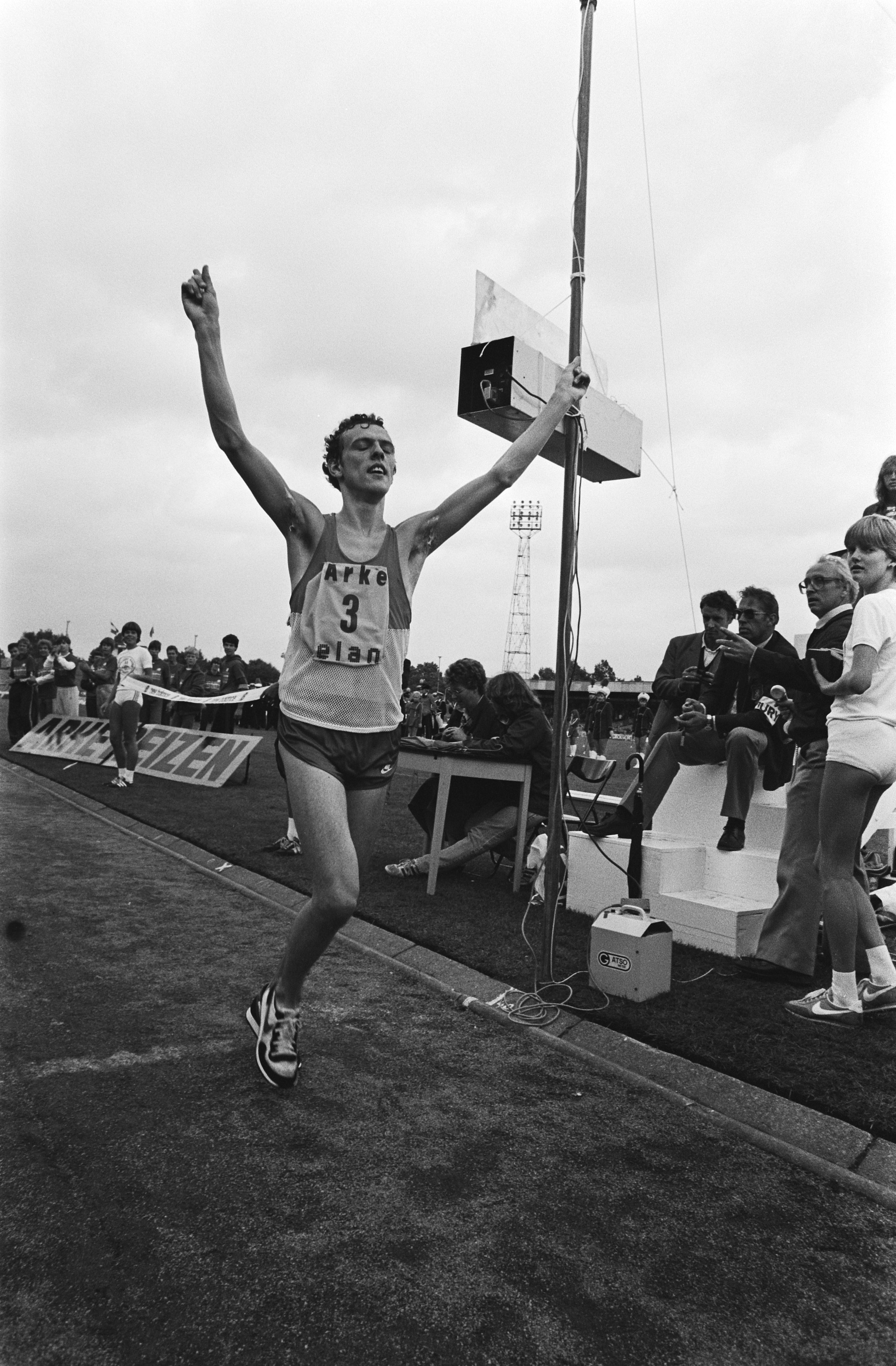 Collectie / Archief : Fotocollectie Anefo Reportage / Serie : Internationale marathon van Enschede Beschrijving : Winnaar Kevin Forster finisht Datum : 10 september 1983 Locatie : Enschede, Overijssel Trefwoorden : marathon Persoonsnaam : Forster, Kevin Fotograaf : Bogaerts, Rob / Anefo Auteursrechthebbende : Nationaal Archief Materiaalsoort : Negatief (zwart/wit) Nummer archiefinventaris : bekijk toegang 2.24.01.05 Bestanddeelnummer : 932-6928